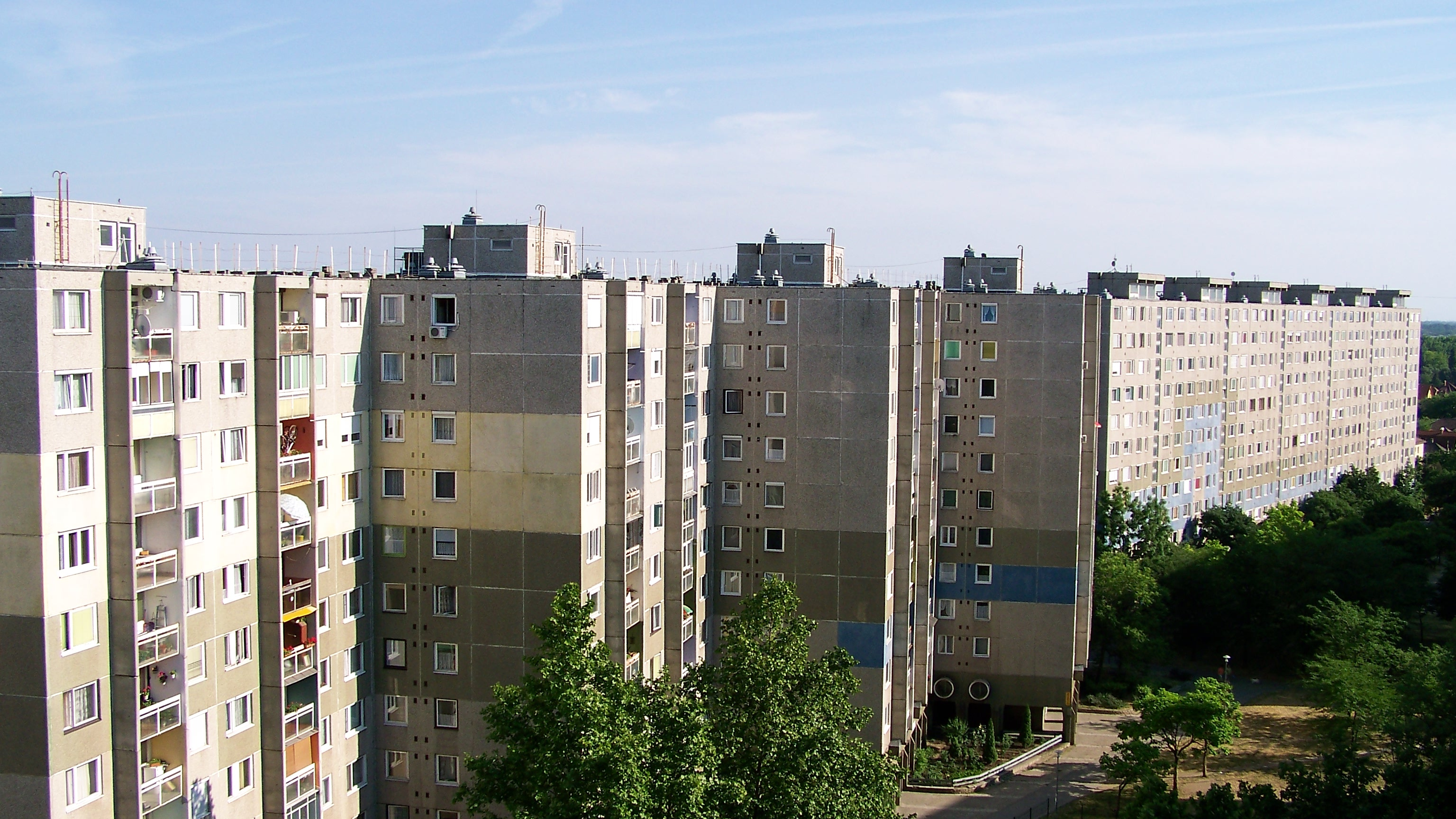 Havanna lakótelep 11. emeletről